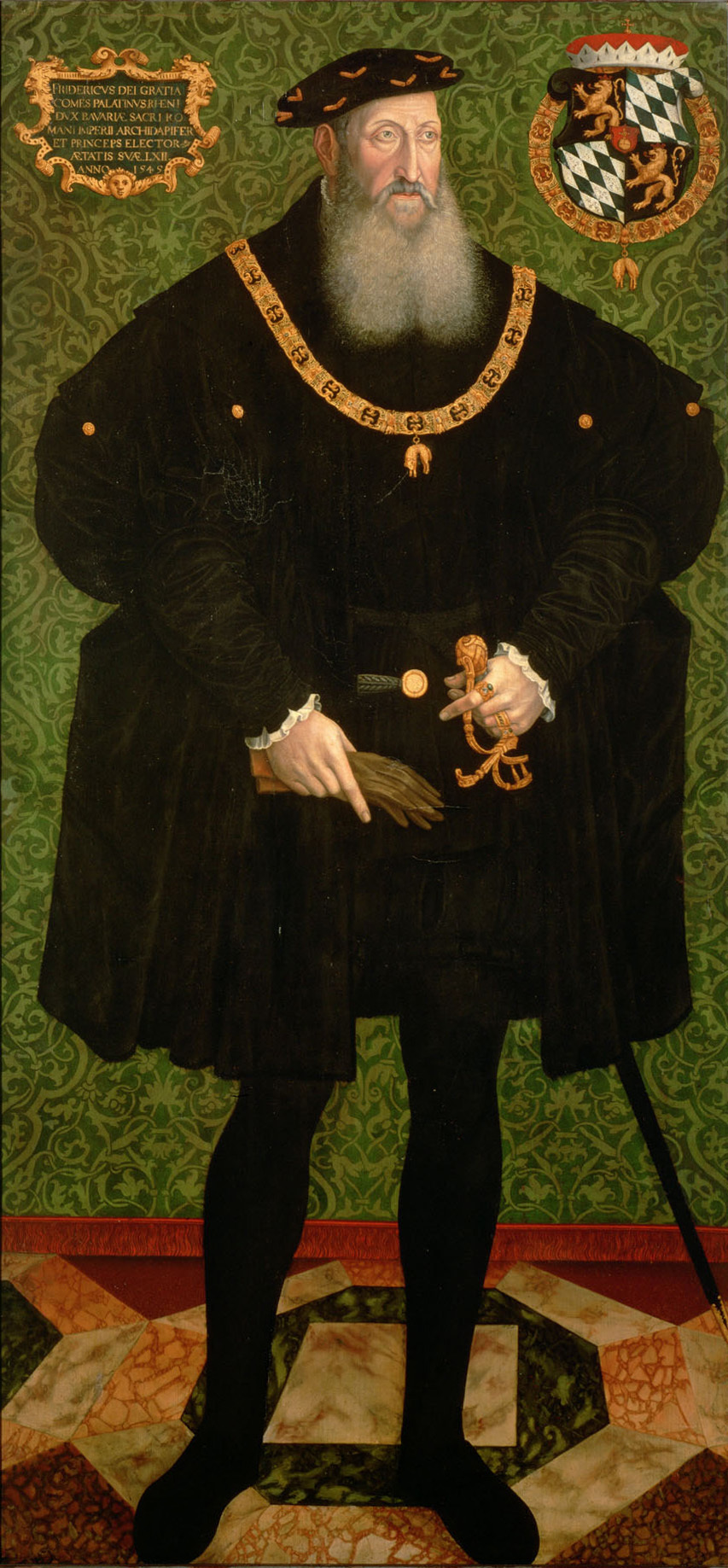 Deutsch, Oberbay(e)risch ? Künstler: Meister der Pfalz- und Markgrafen Mitte 16. Jahrhundert tätig Gemälde: Pfalzgraf Friedrich II. (1482-1556), in ganzer Figur Beschriftung: Rechts im Hintergrund: Wappen bekrönt mit dem Kurfürstenhut Provenienz: Aus Ambras Abgebildete Person: Kurfürst Friedrich II. Sohn des Philipp von der Pfalz